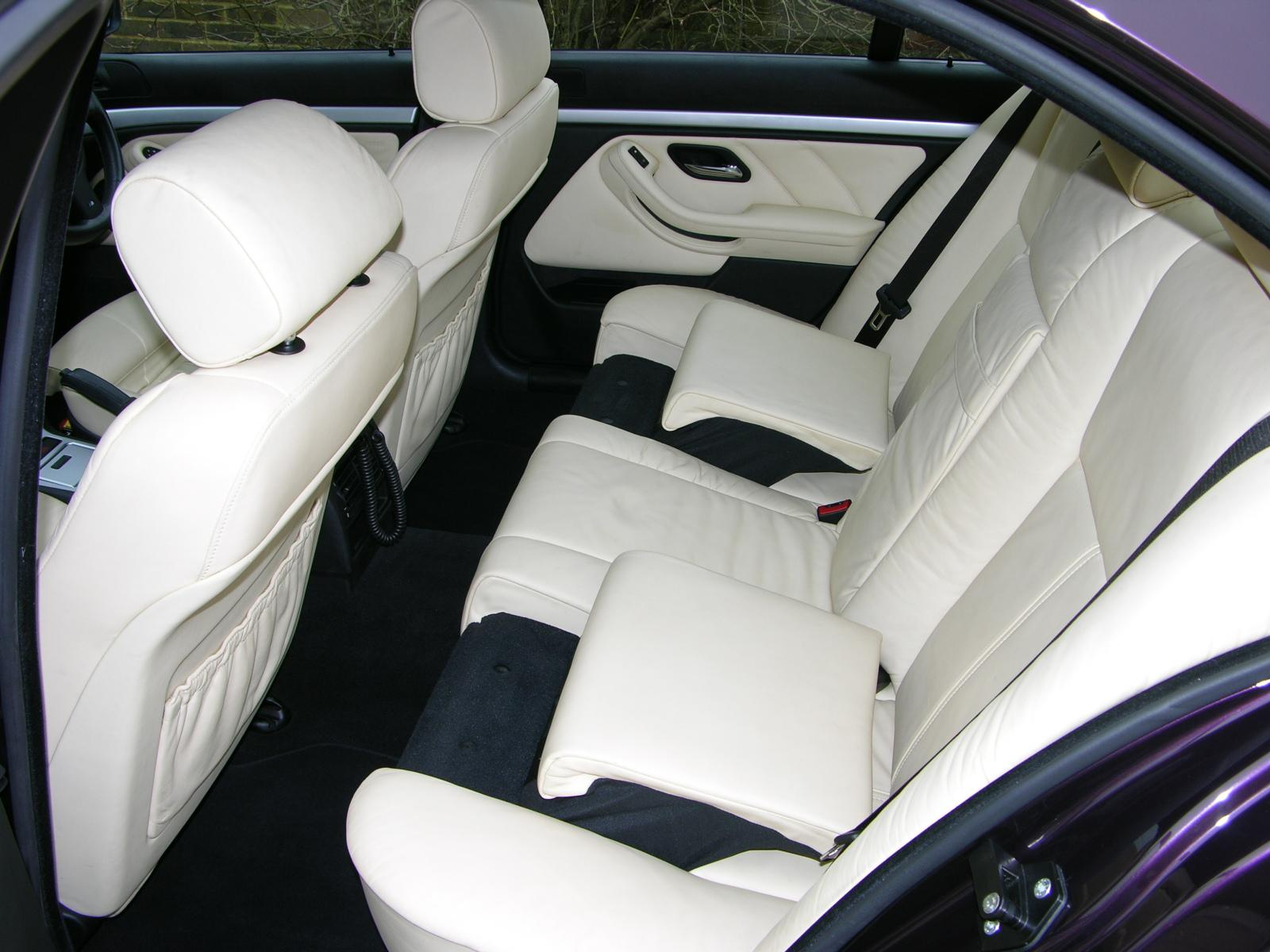 BMW 530i Sport Individual